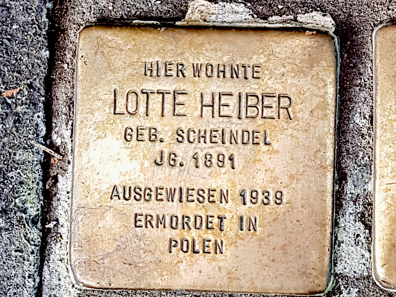 Stolperstein für Lotte Heiber, geb. Scheindel, Jg. 1891, ausgewiesen aus Duisburg 1939, ermordet in Polen